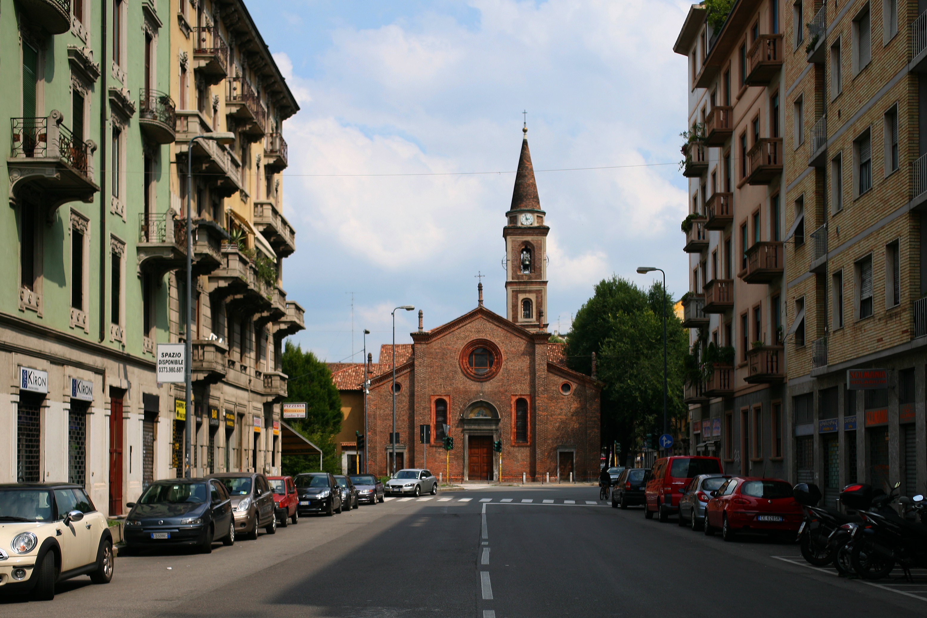 Vista generale dell'Abbazia del Casoretto, Milano, vista dall'omonima via.